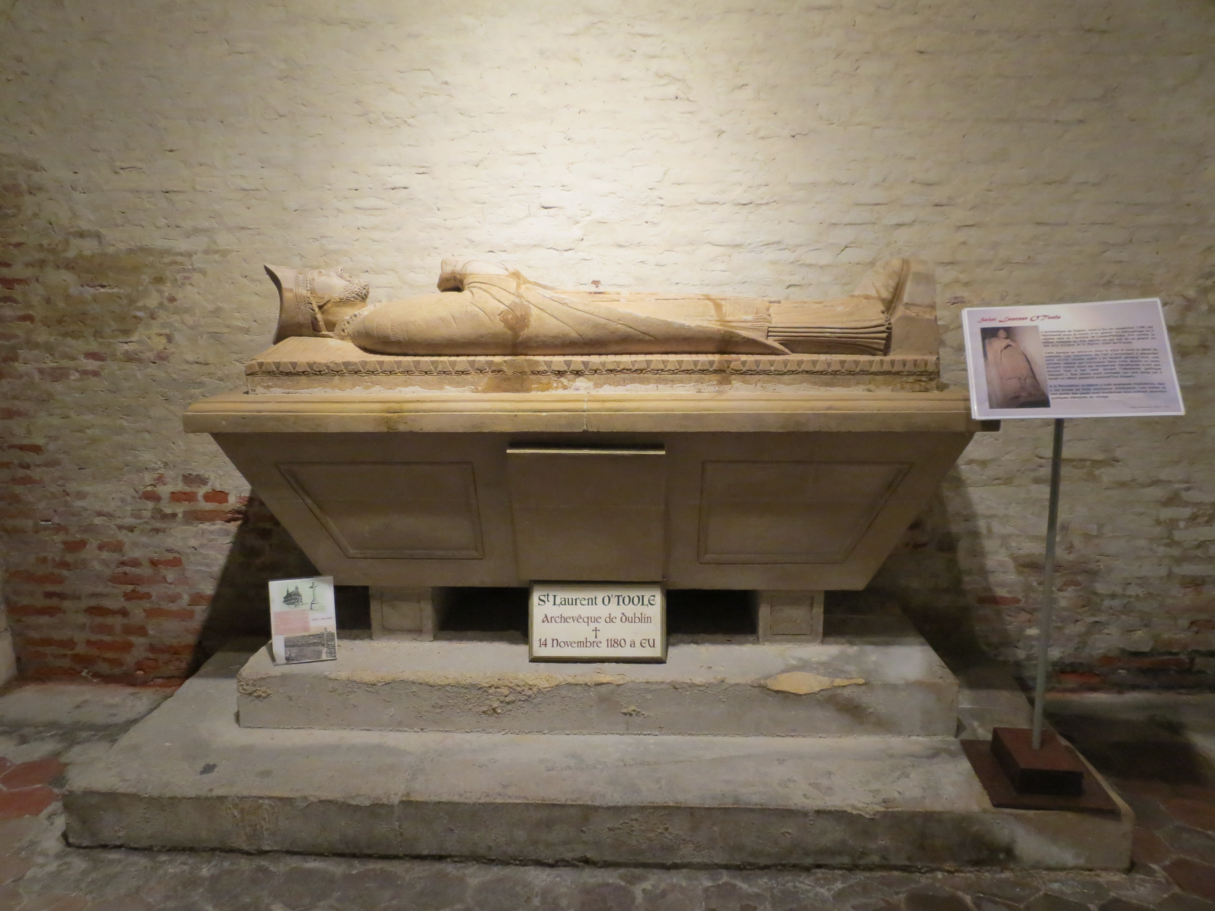 Gisant de Laurent O'Toole.